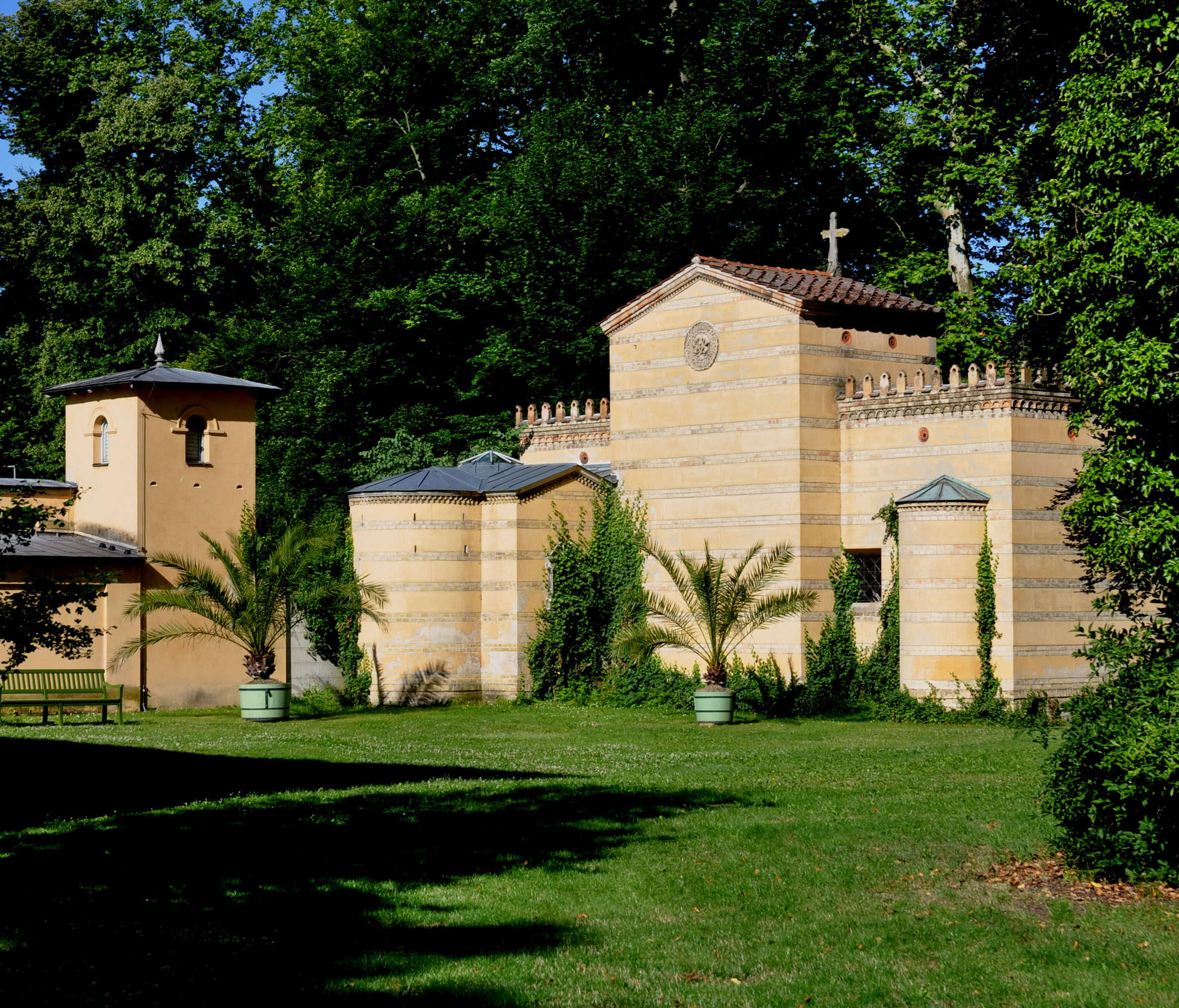 Blick vom Weg zum Wassertor auf den Klosterhof